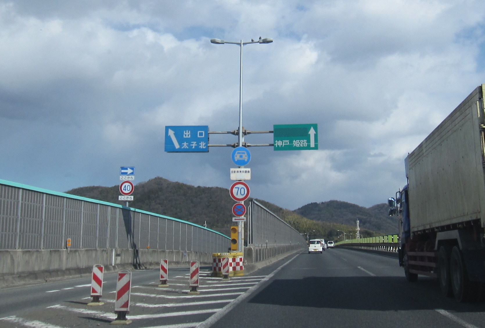 太子竜野バイパス太子北ランプ